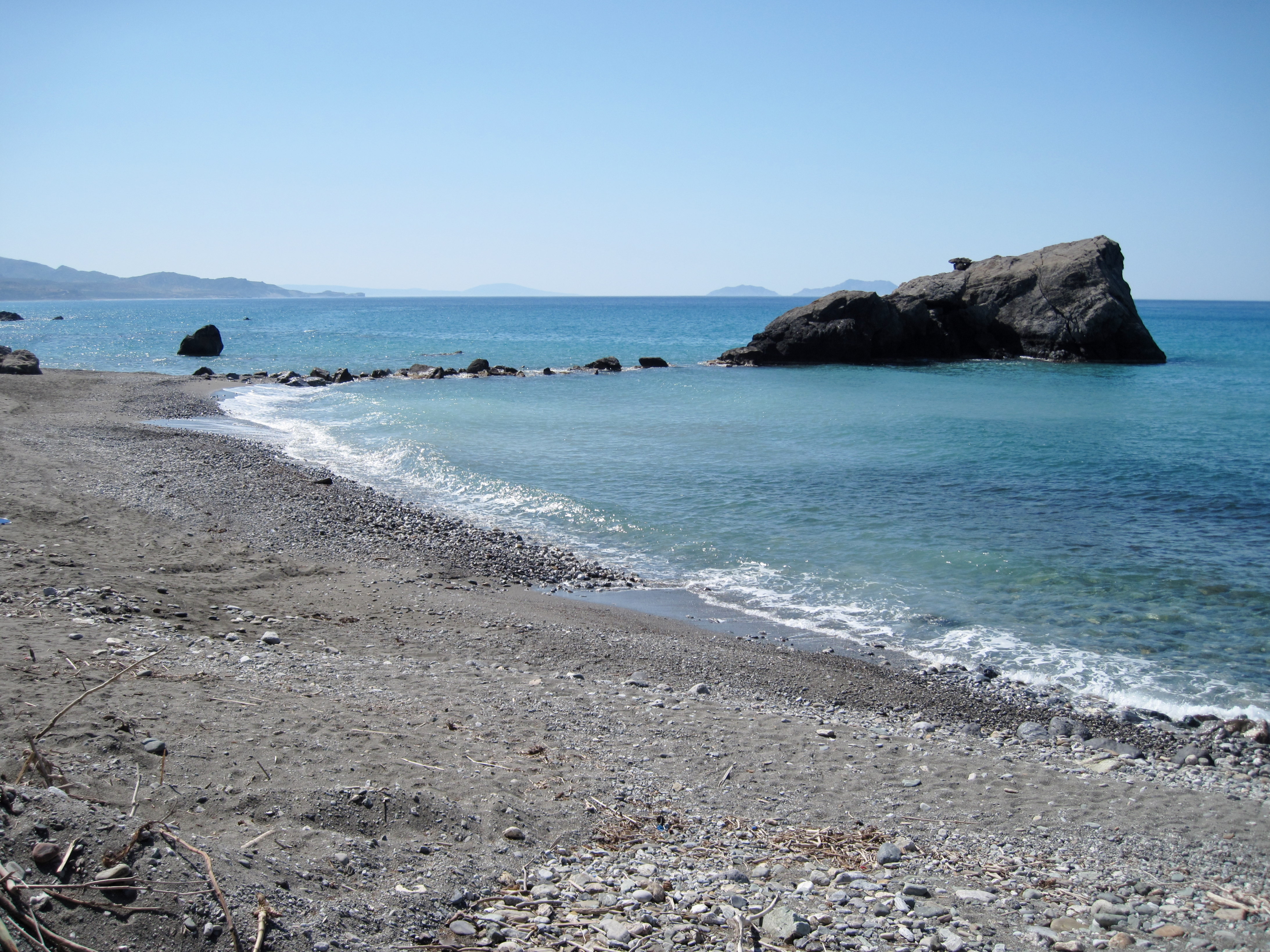 Drymiskiano Ammoudi („Sandstrand von Drymiskos“), Gemeinde Finikas, Präfektur Rethymno, Kreta, Griechenland